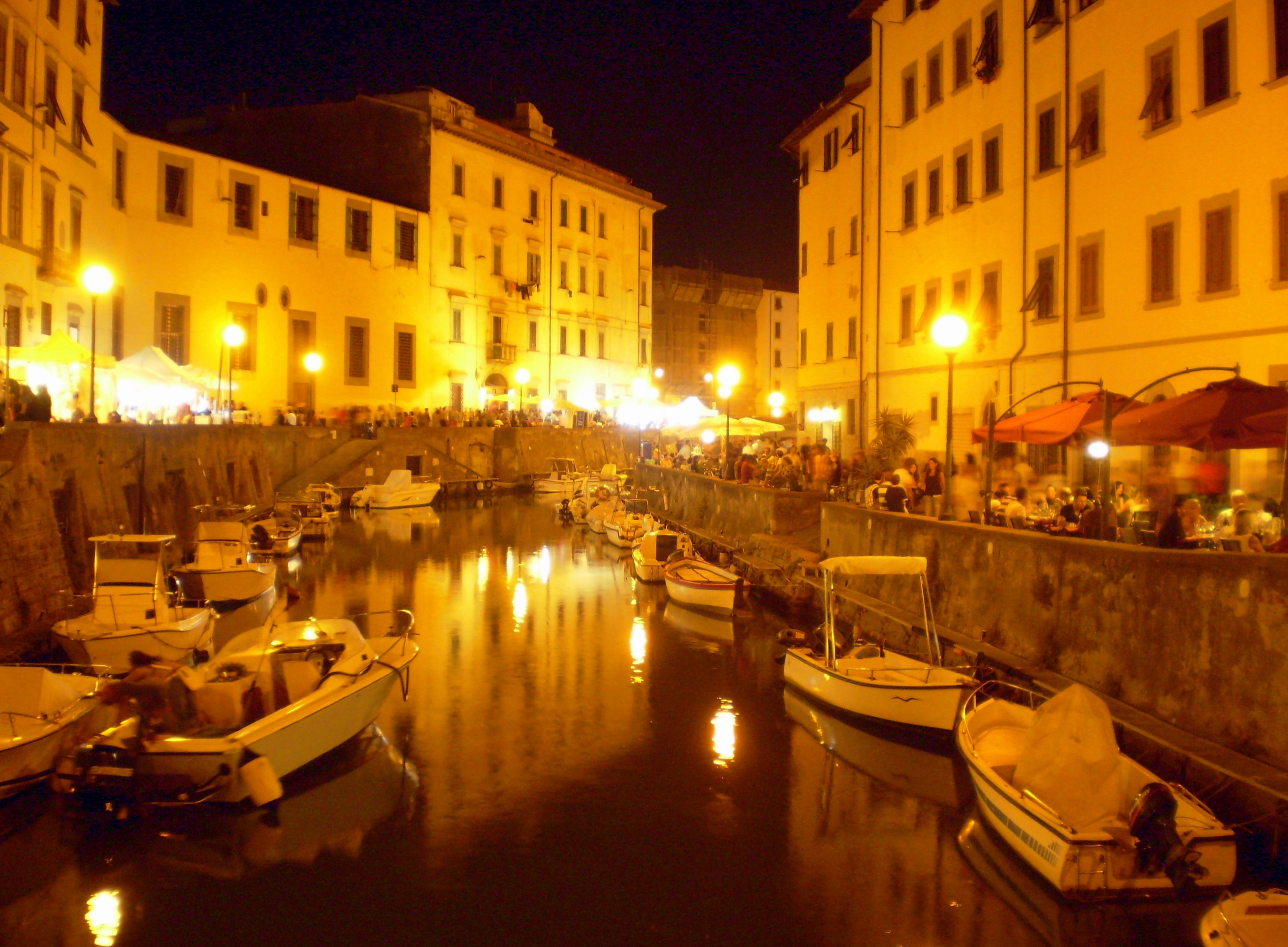 Livorno: il quartiere della Venezia Nuova durante la manifestazione di Effetto Venezia 2007.